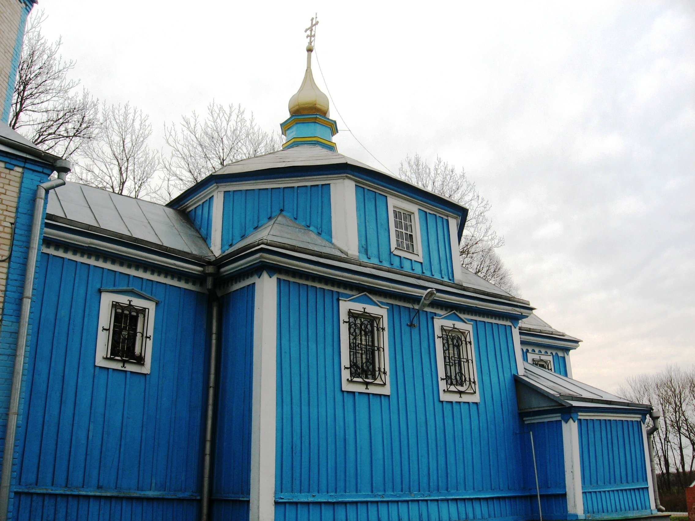 Усичі, Луцький район. Церква Св. Стефана, 1795